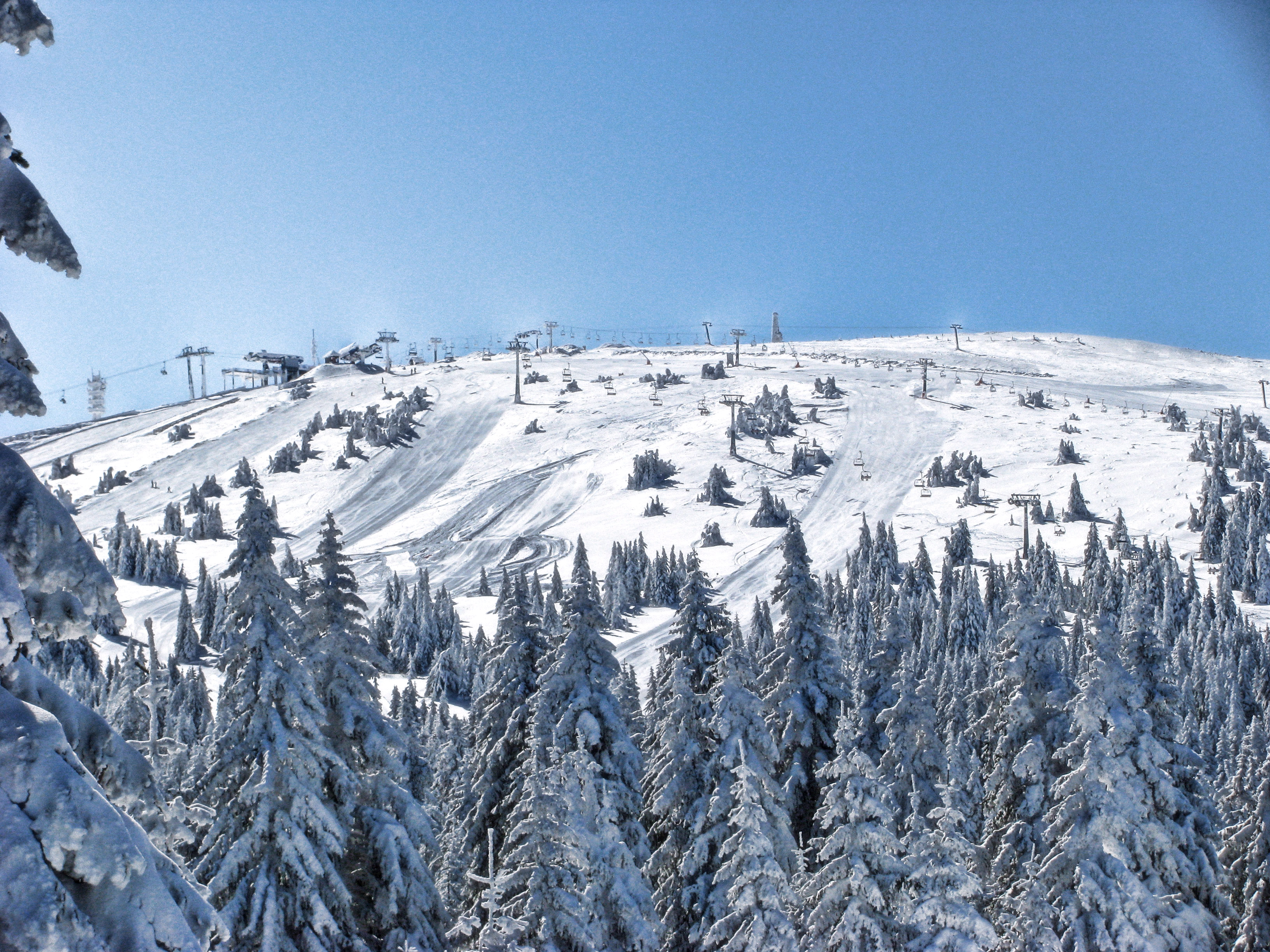 Pančićev vrh during winter